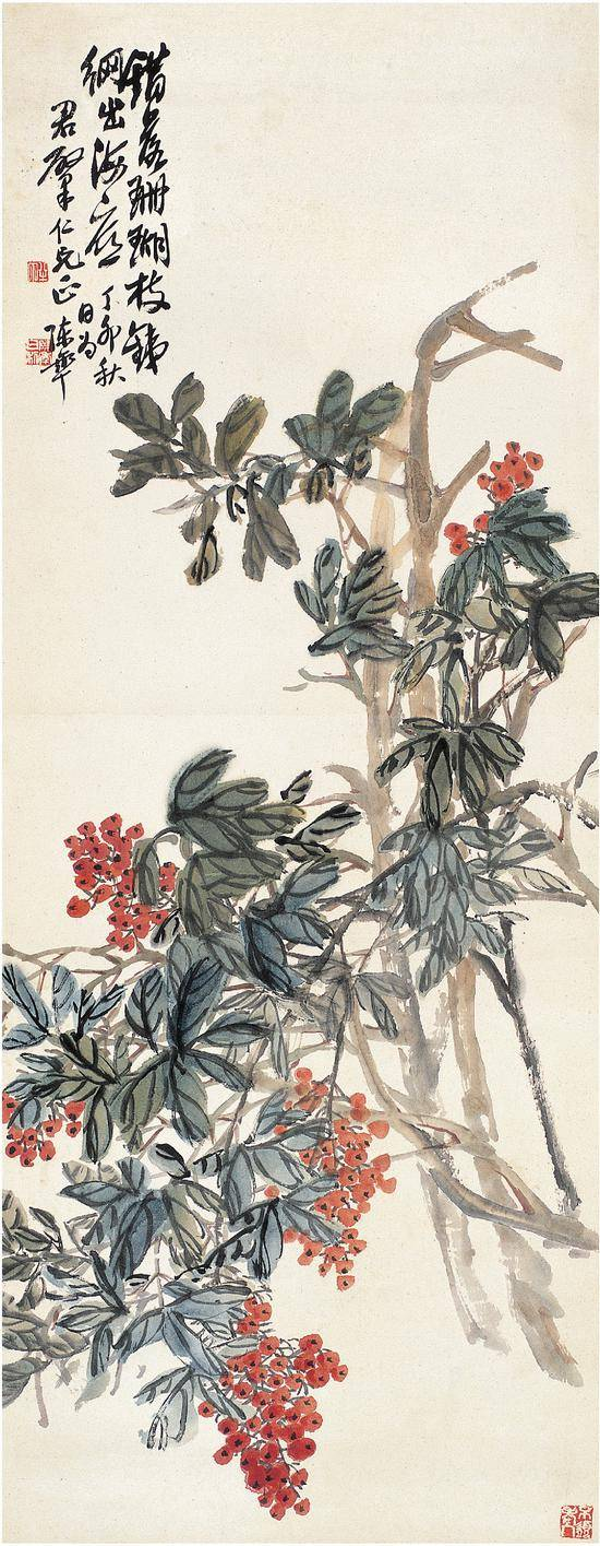 中文（中国大陆）: 陈半丁珊瑚枝图，1927年繪